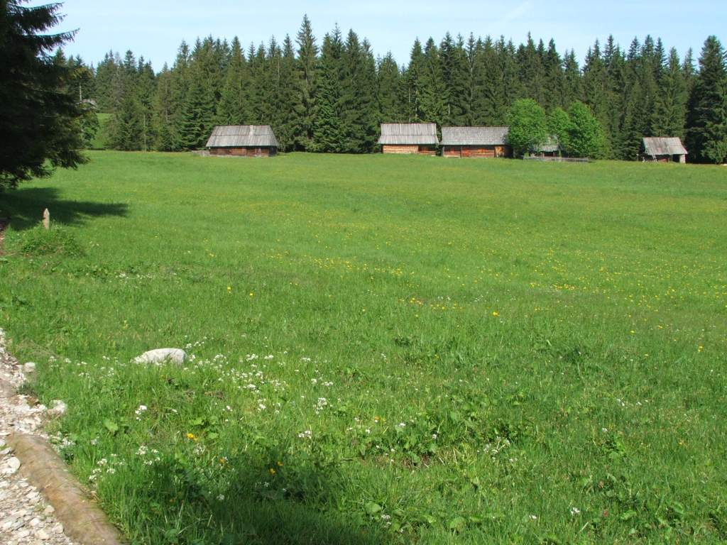 Biała Polana pod Tatrami